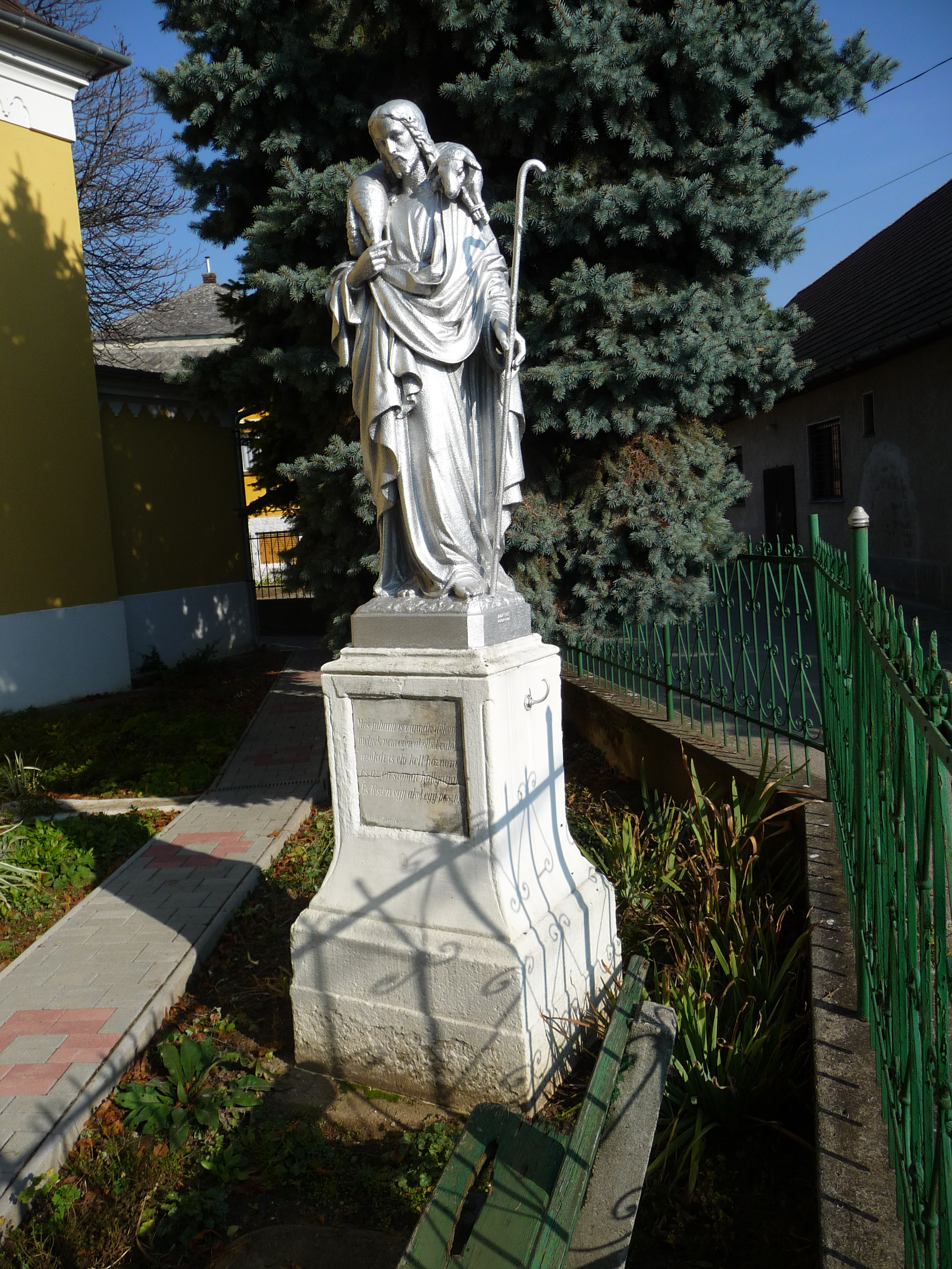 A Jó Pásztor szobra Domonyban